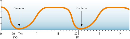 Progesteronverlauf bei der Kuh